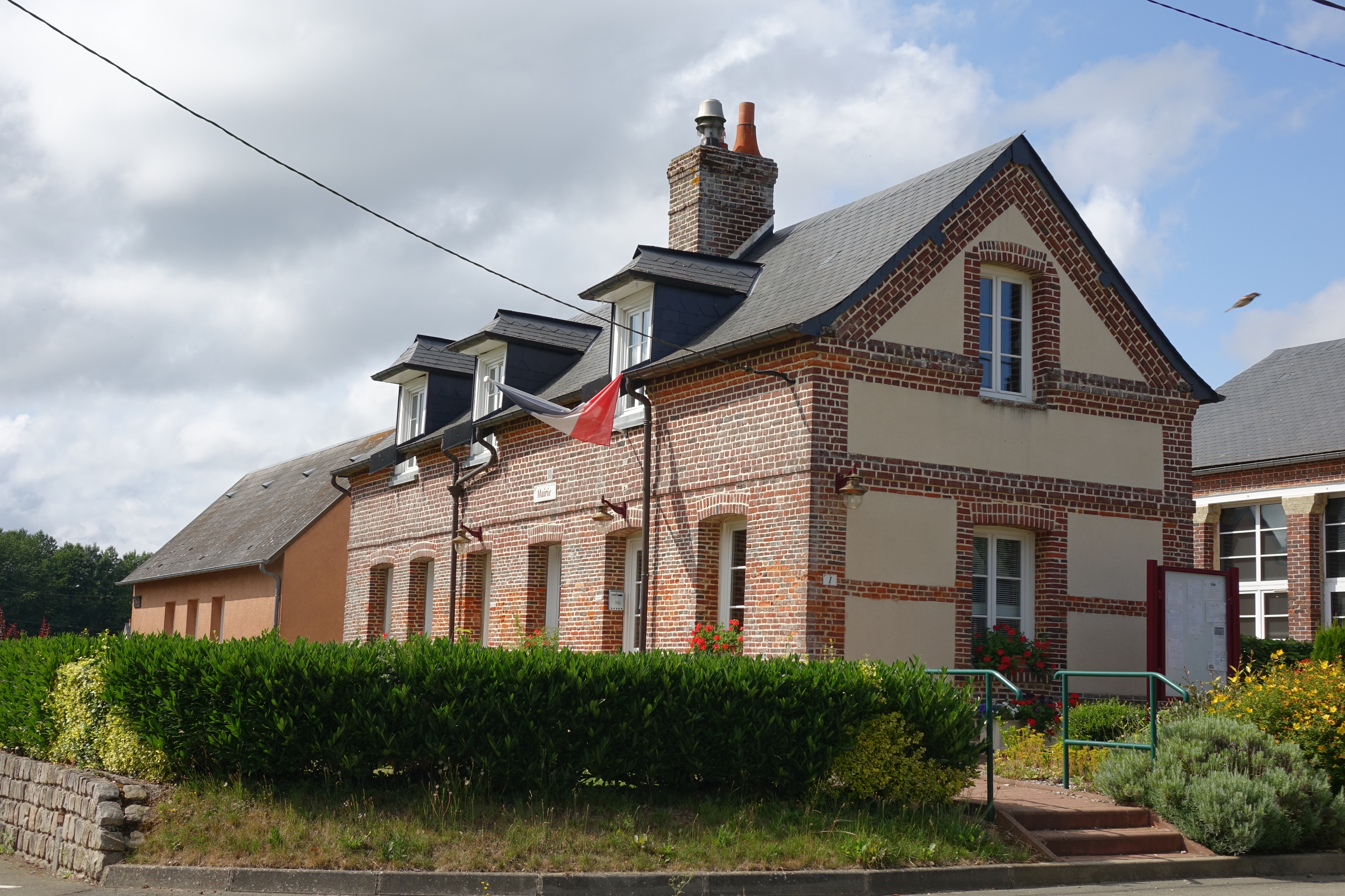 Mairie de Ventes-Saint-Rémy, Seine-Maritime, France